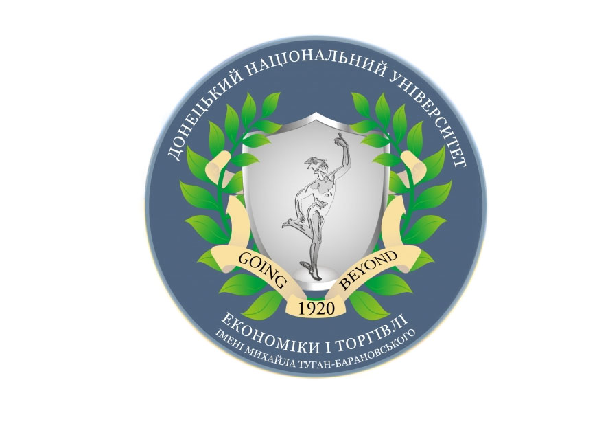 Герб Университета